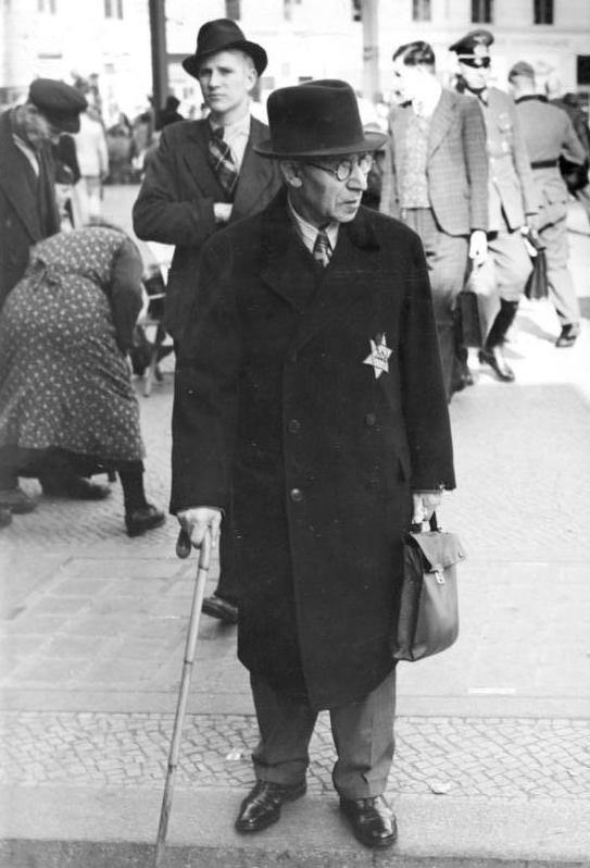 Jude mit Stern in Berlin ADN-ZB-Archiv Jüdische Menschen wurden durch das faschistische Rassengesetz gezwungen ab 1941 als Kennzeichnung den "Davidstern" zu tragen. [Berlin] [Scherl Bilderdienst]